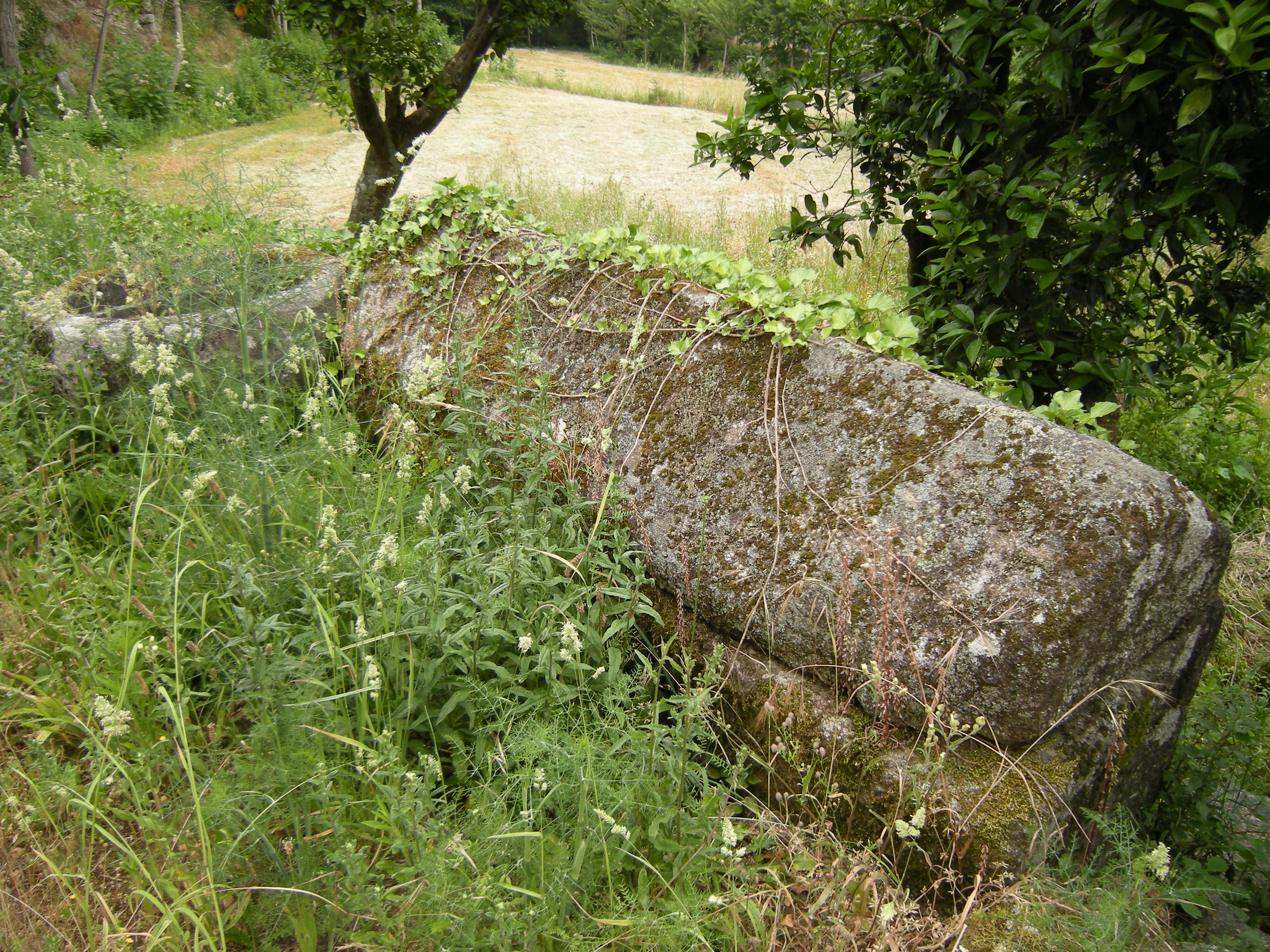 Iglesia de São Salvador de Lufrei